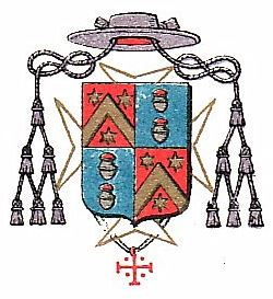 Armoiries de Mgr Xavier Barbier de Montault